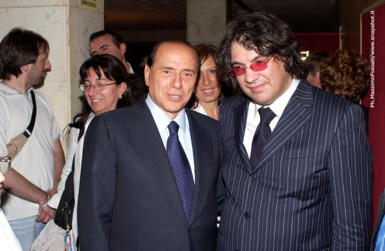 COn SIlvio Berlusconi in occasione della sfilata al Teatro Manzoni di Milano, 2006